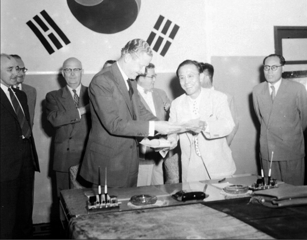 유완창 부흥부장관과 주한미국 대사 엘리스 브리그스, 한미원조 조인1.500만불 조인식 참석